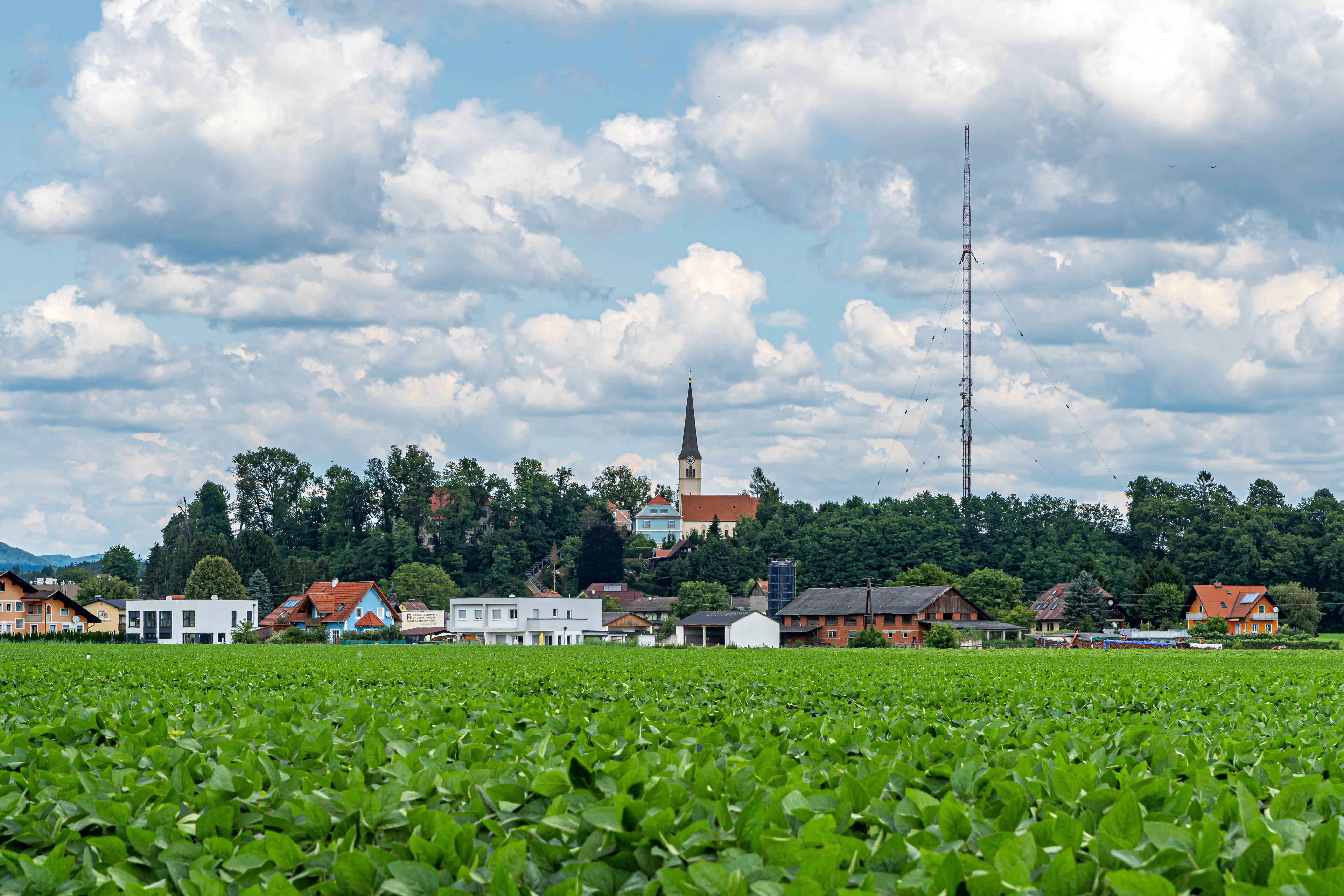 Gesamtansicht der Ortschaft Dobl mit den denkmalgeschützten Objekten Sendeanlage Dobl (ehem. Sender Alpen) Kath. Pfarrkirche hl. Maria in Dorn und ehem. Friedhof Dobl